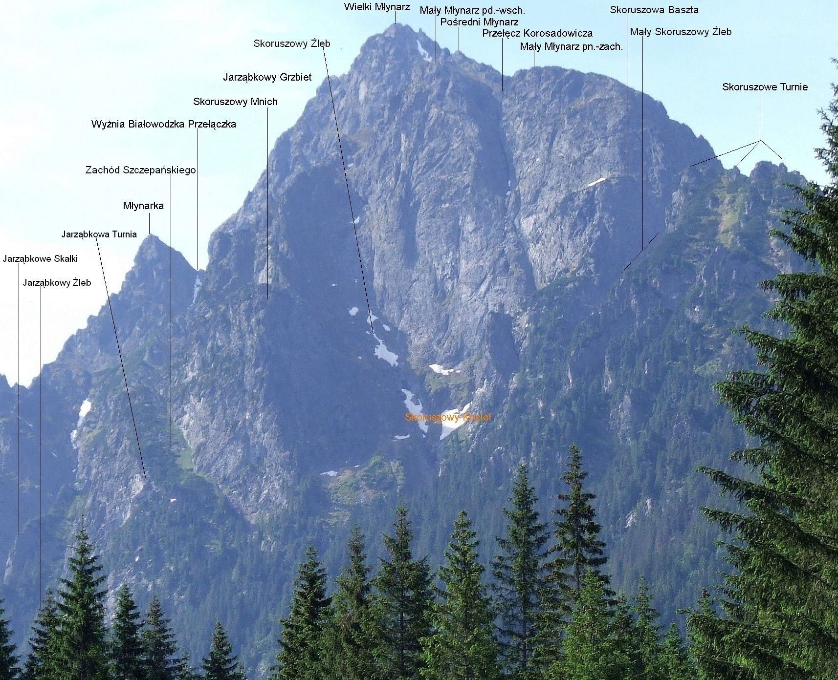 Młynarz (Tatry)